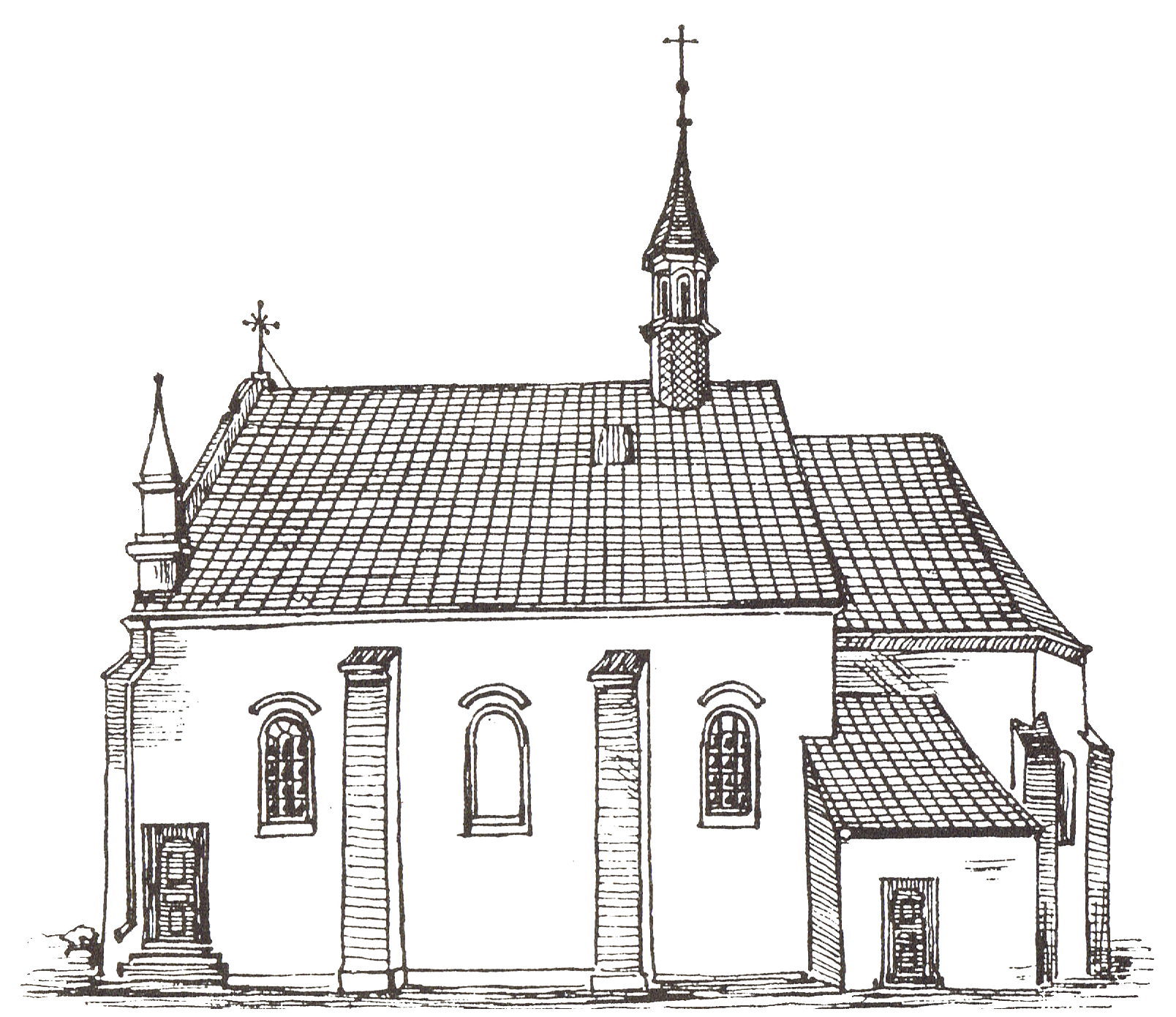 ryc. przedstawiająca kościół św. Mikołaja w Wysokiej (w pow. szydłowieckim)